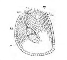 Fig 69. — Ovule d’une fleur épanouie : kh, son enveloppe ; es, sac embryonnaire ; km, ouverture ovulaire (ou micropyle) par laquelle pénètre le boyau pollinique(gr. 200/1). D’après Schacht.